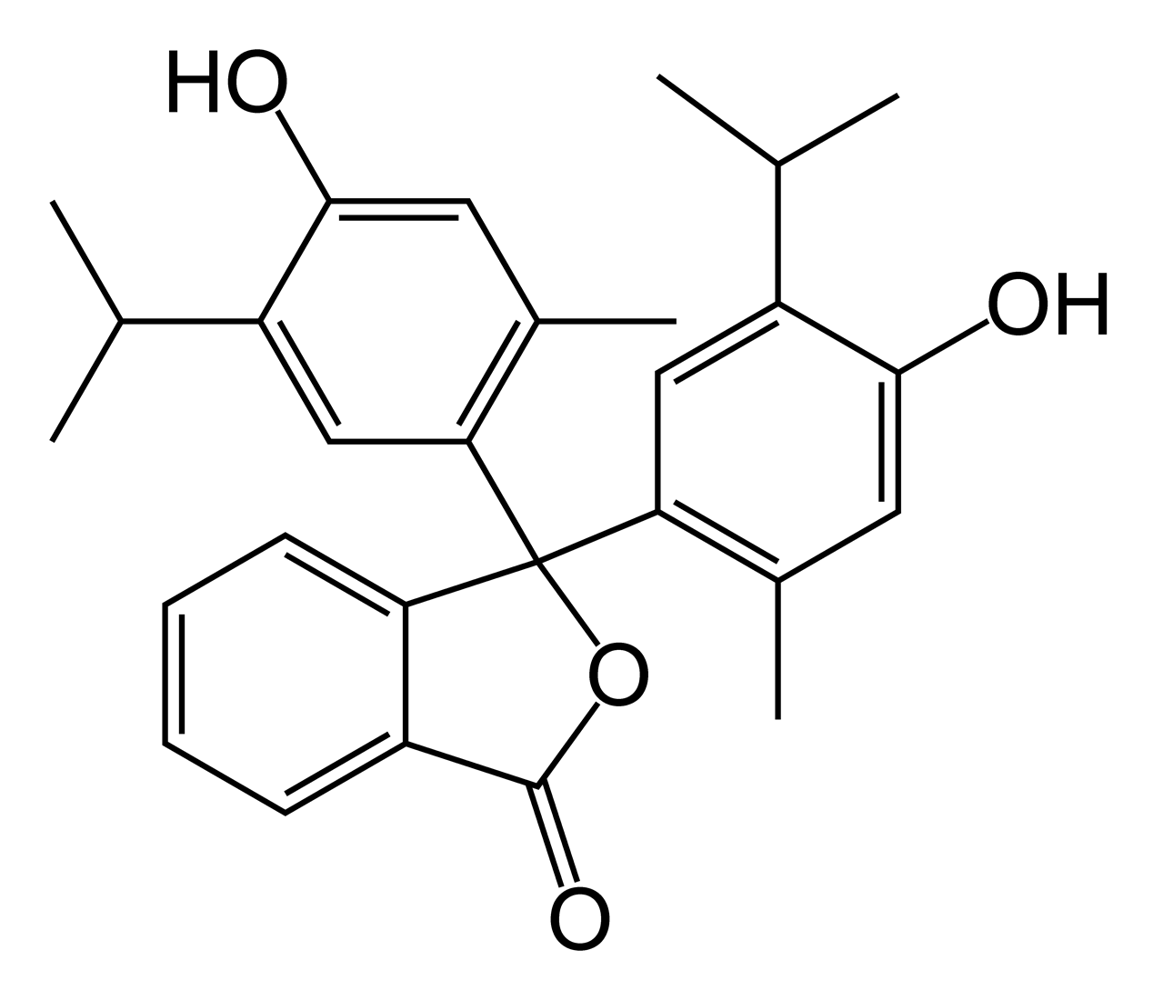 Thymolphthalein-skeletal